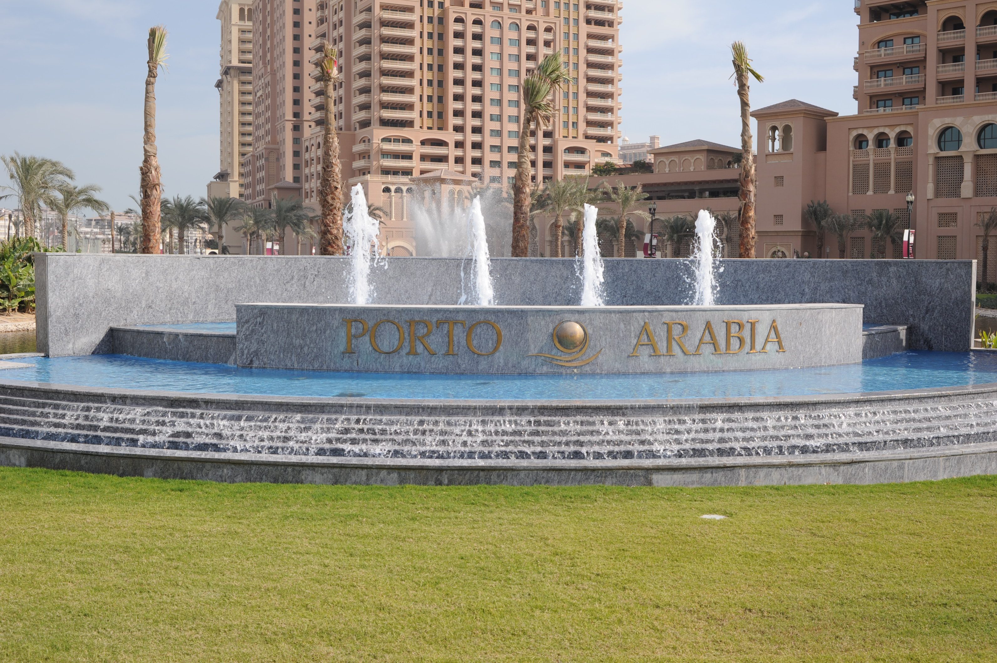 Welcome to Porto Arabia